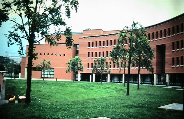 Palazzo Telecom, Bellinzona